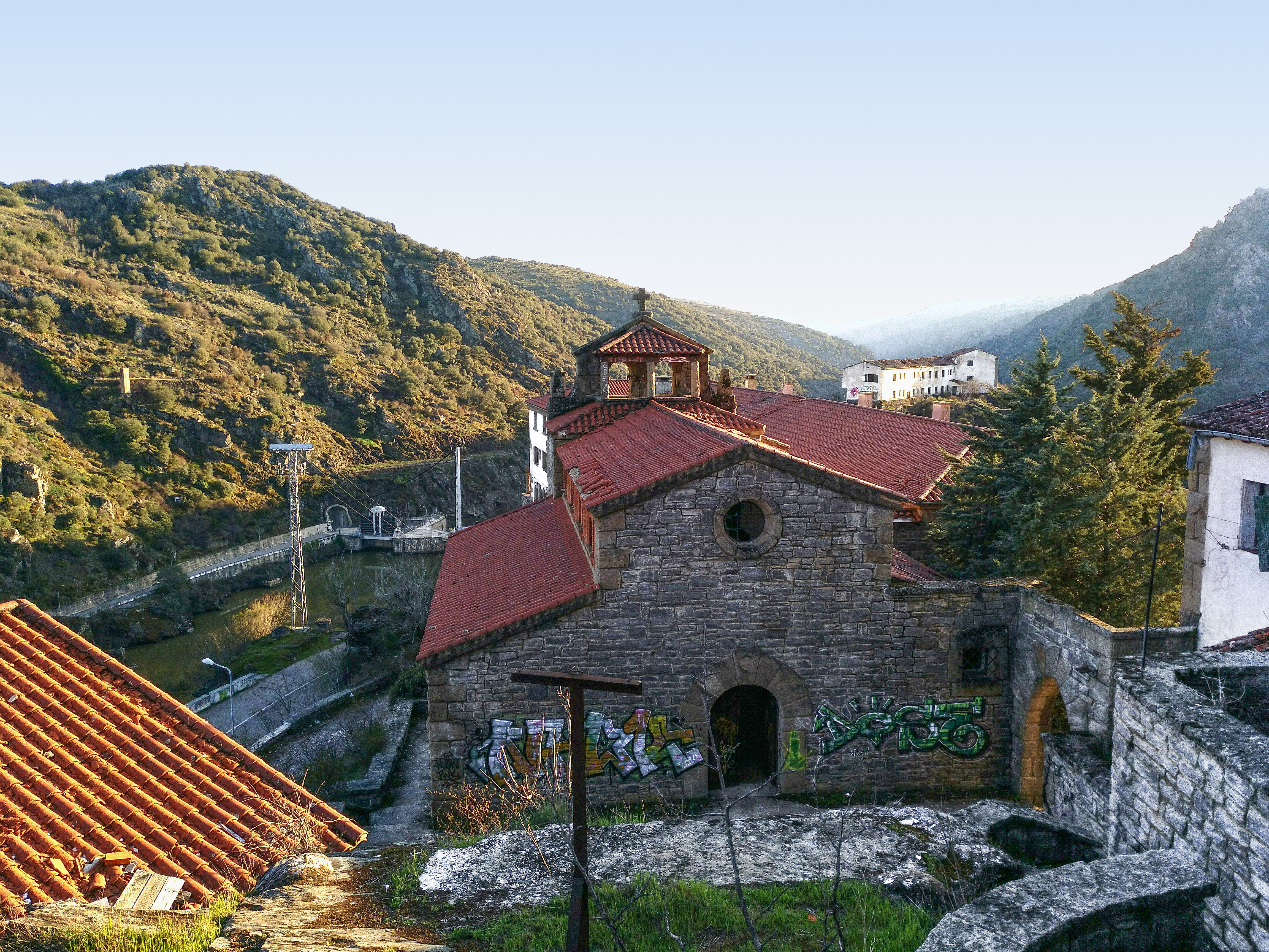 Panorámica del poblado del Salto de Castro, construido a mediados del siglo XX junto a la presa de Castro, en la provincia de Zamora, Región Leonesa, España.